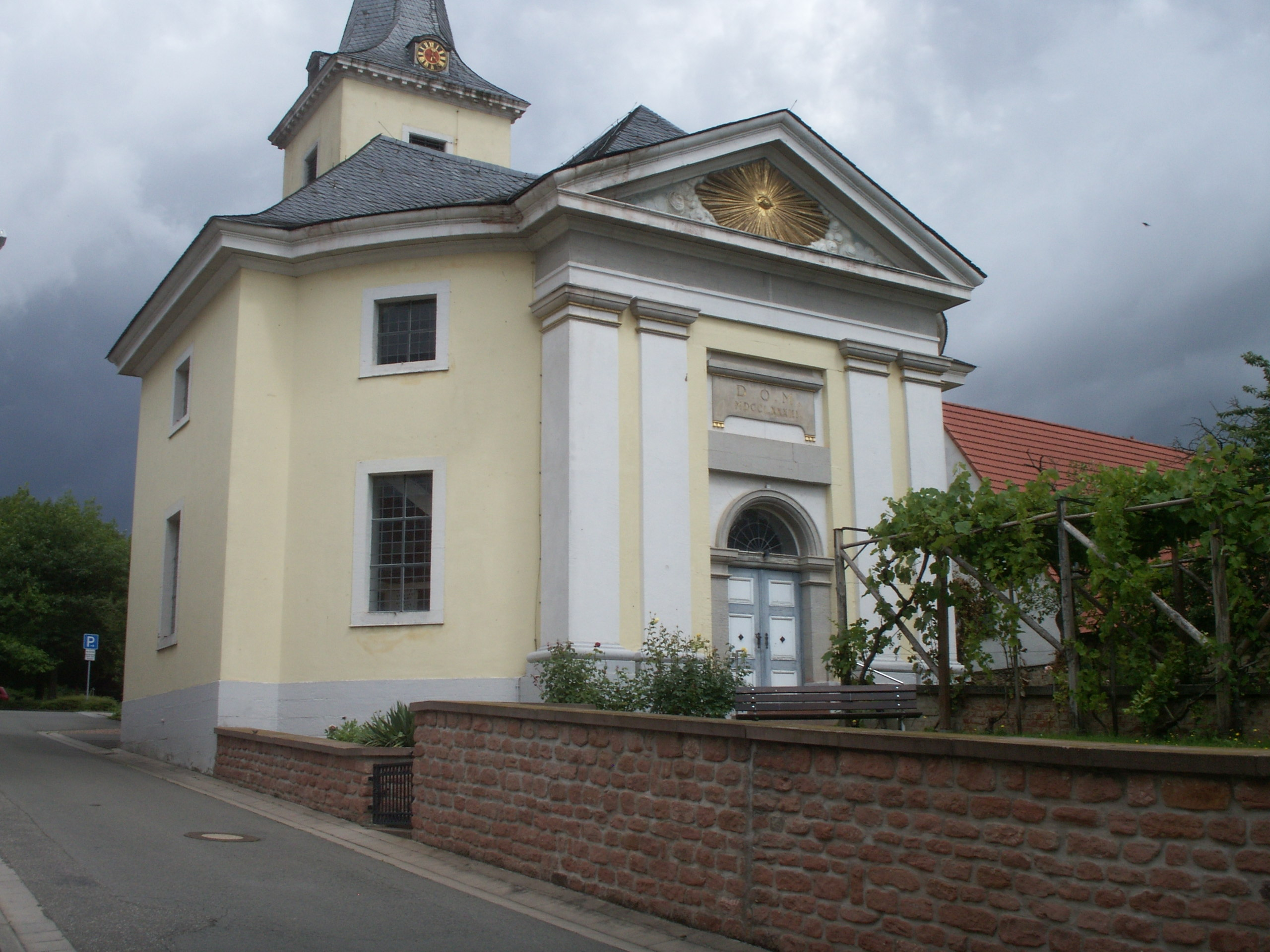 Protestantische Pfarrkirche, kreisrunder frühklassizistischer Zentralbau, 1783, Architekt: Johann Georg Christian Hess